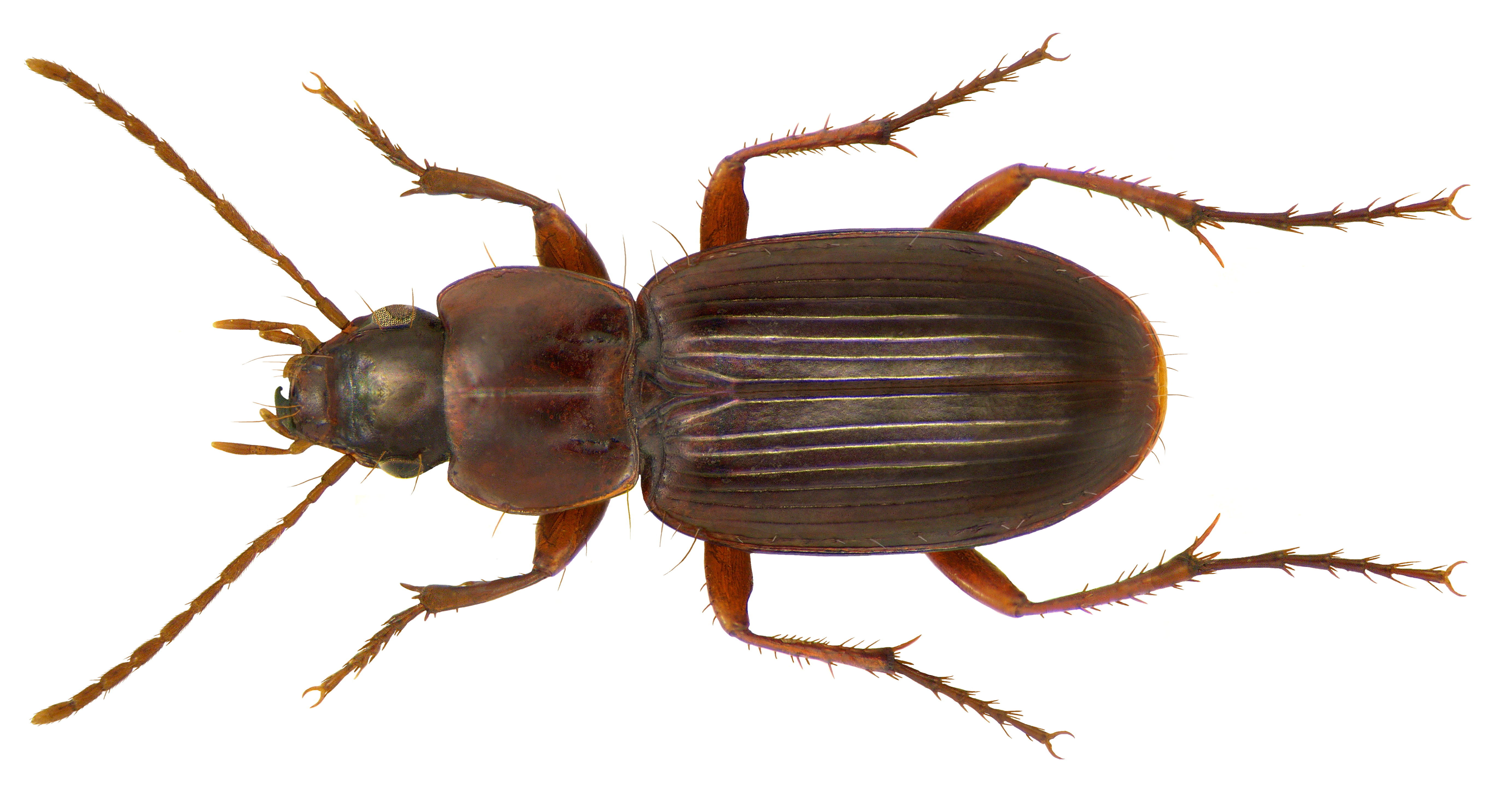 Familie: Carabidae Grösse: 5,5-9 mm Verbreitung: Europa Ökologie: vor allem in offenen Lebensräumen in tieferen Lagen Fundort: England, Harwich leg.det. M.G.Telfer, 2004 Foto: U.Schmidt, 2009